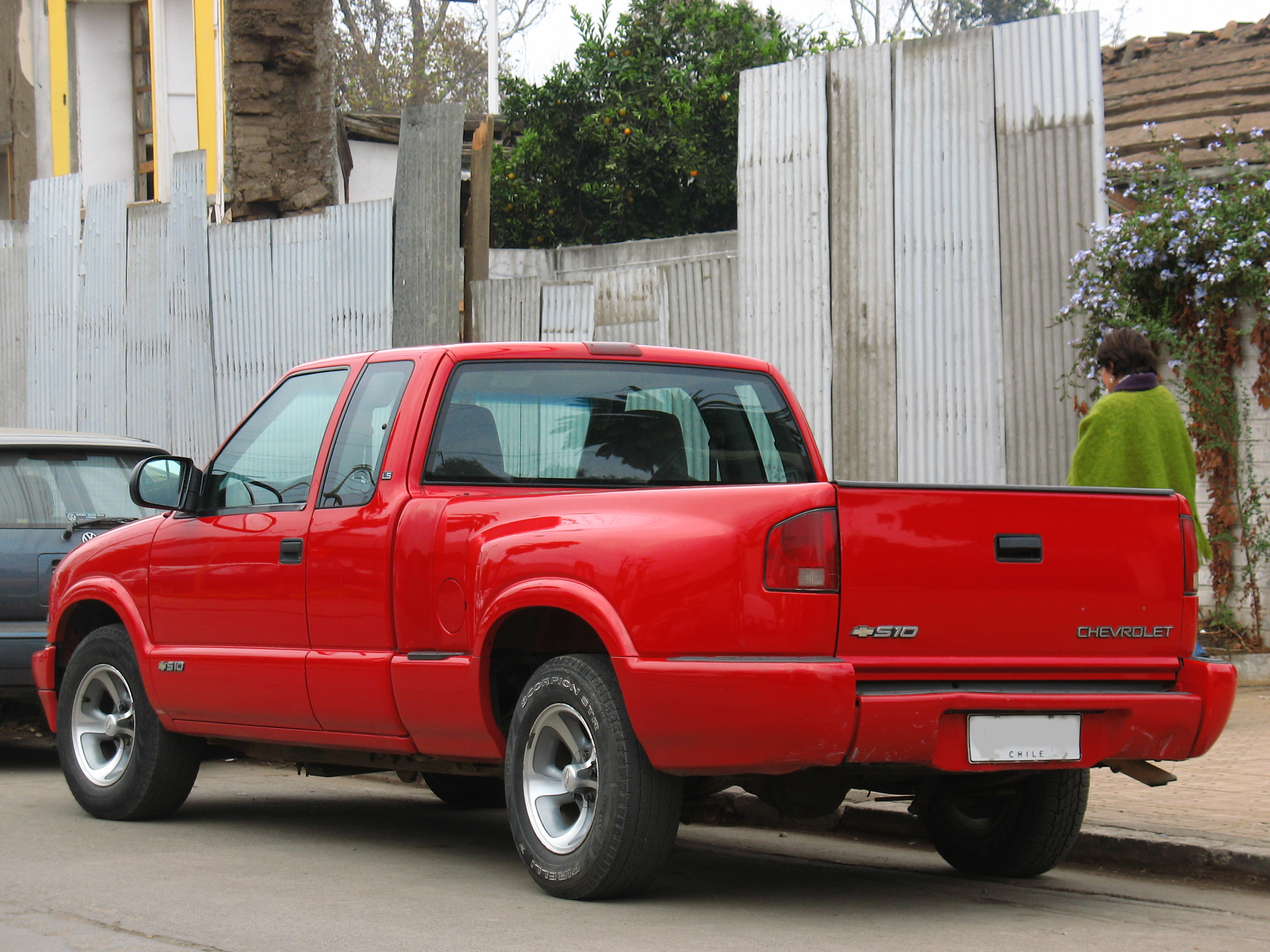 Chevrolet S-10 4.3 LS Sidestep 2001